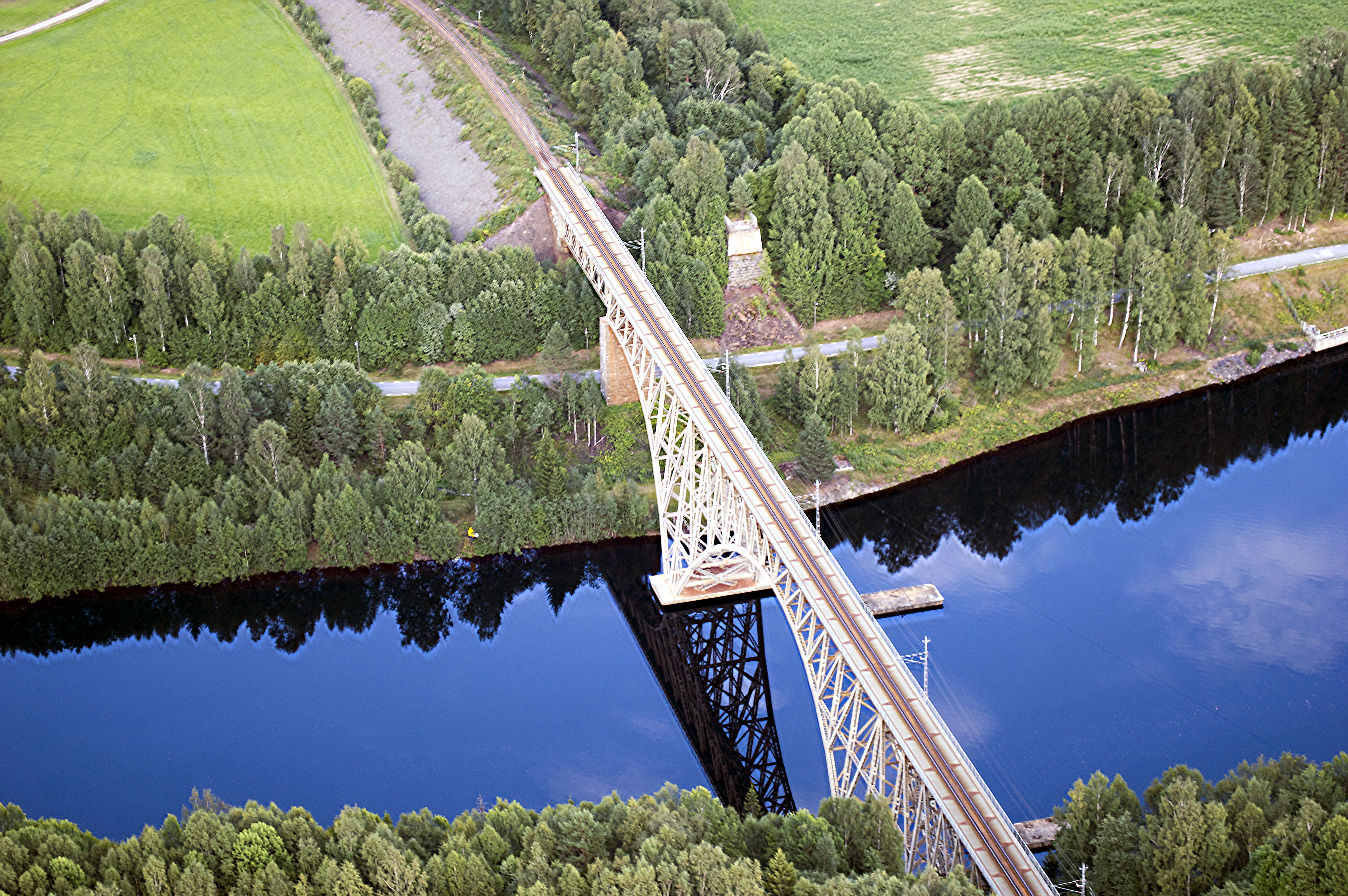 Forsmo Järnvägsbron